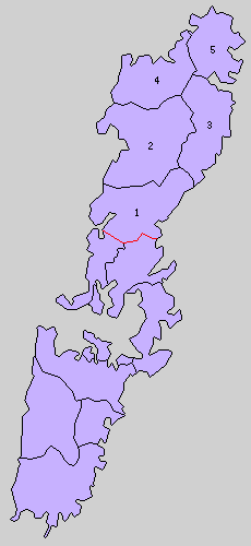 長崎県上県郡の島嶼町村制時点の町村。